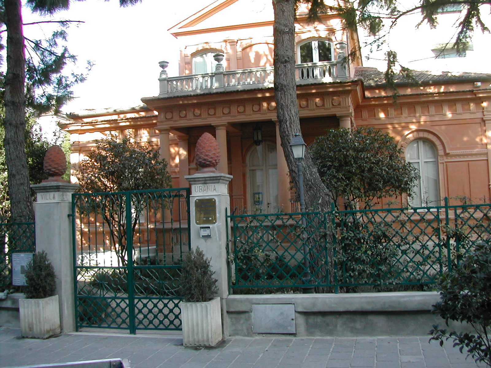 Pescara_Villa_Urania_Museo_Paparella_Treccia